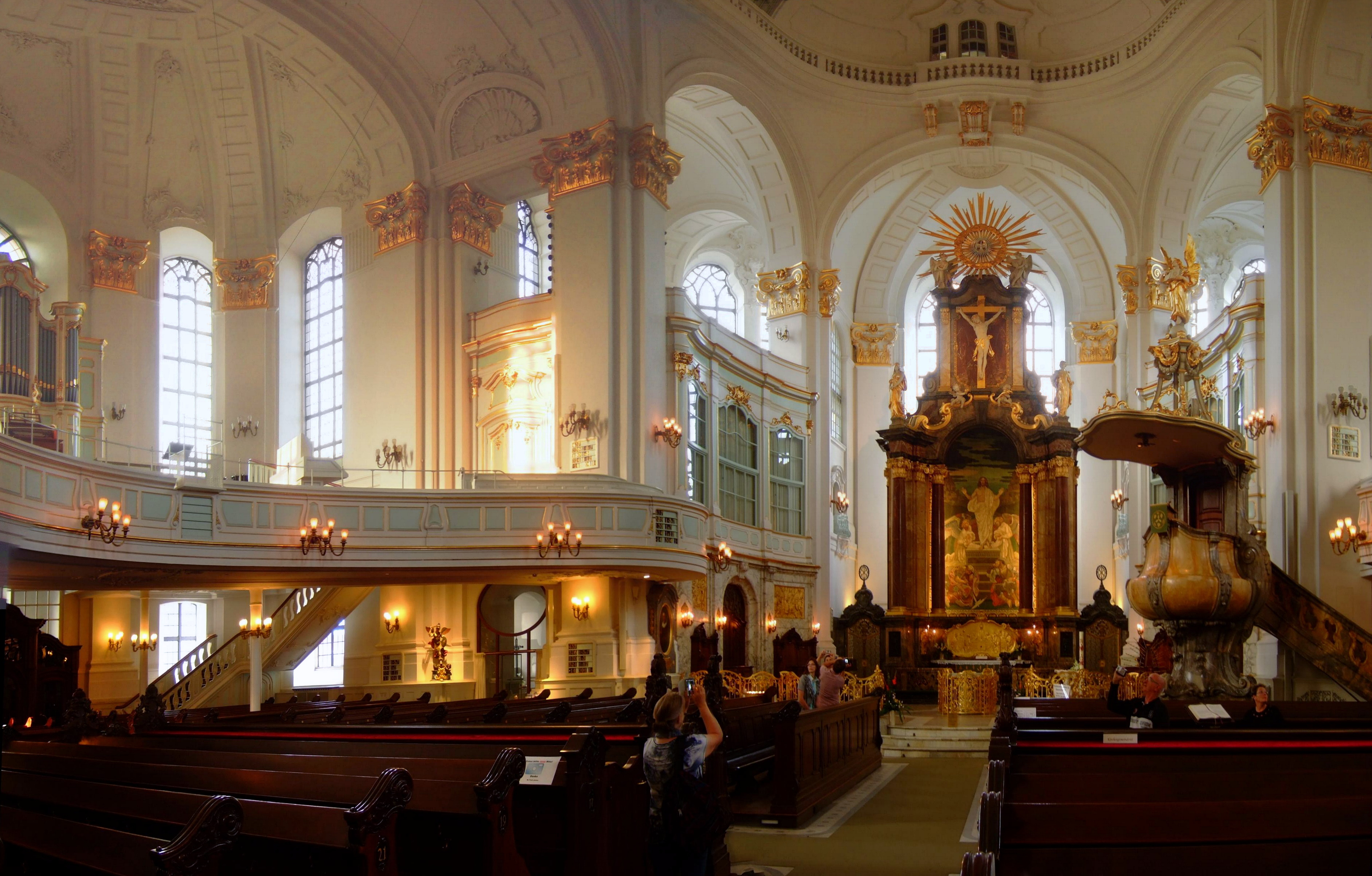 Das Bild zeigt den Innenraum der Hamburger Hauptkirche St. Michaelis (Michel).